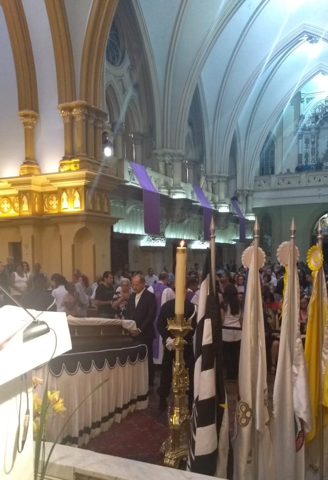 Exéquias do Cardeal